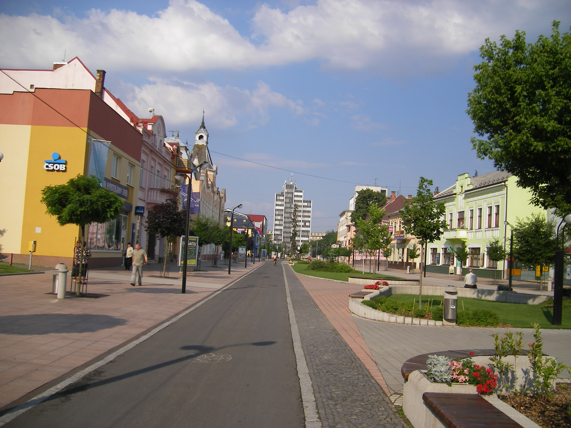 Michalovce, Main Square - Námestie Osloboditeľov